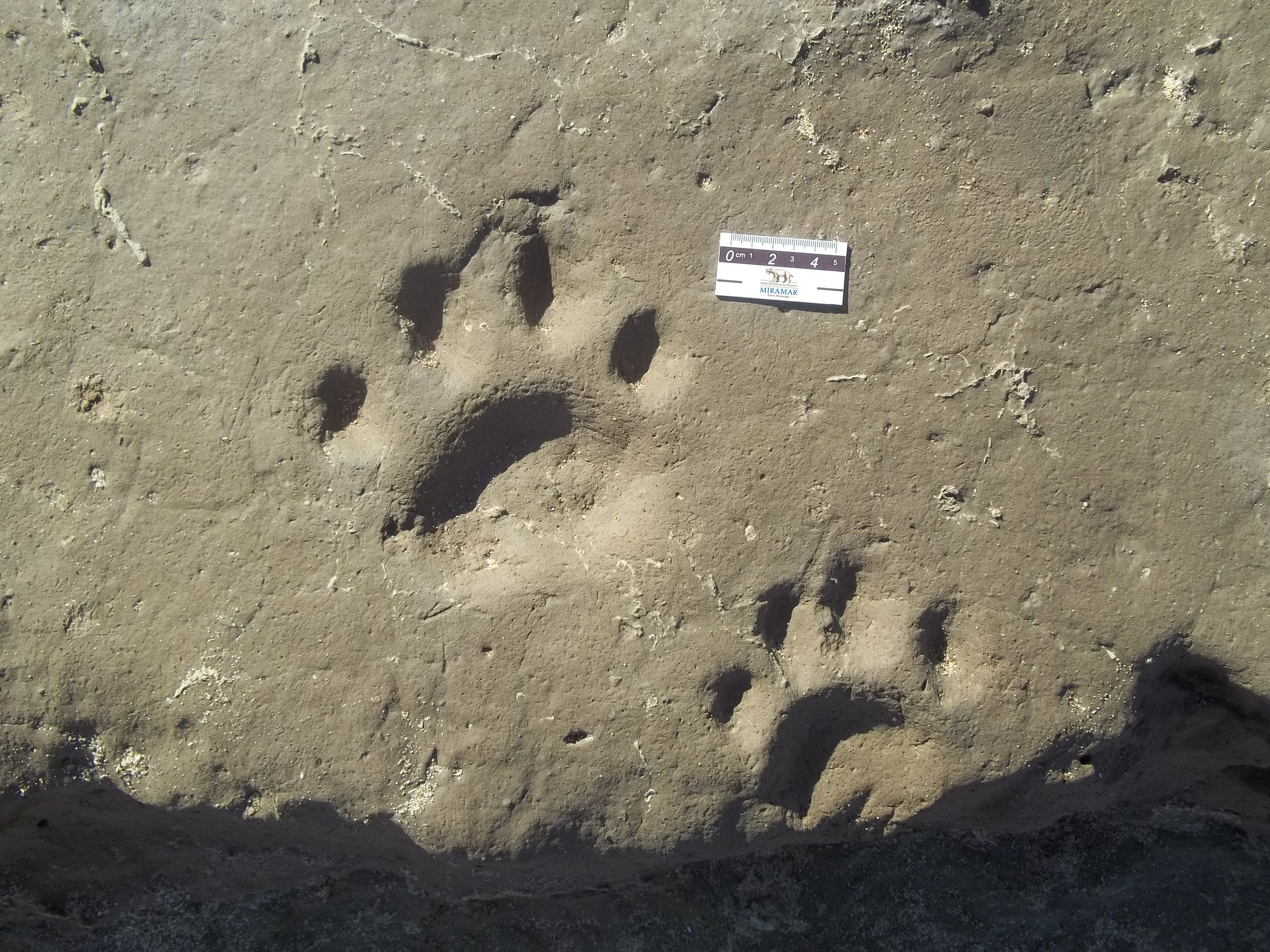 Huellas fósiles o Icnitas, atribuidas a Felipeda miramarensis. Coleccion del departamento científico de Paleontología, Museo de Ciencias Naturales de Miramar.